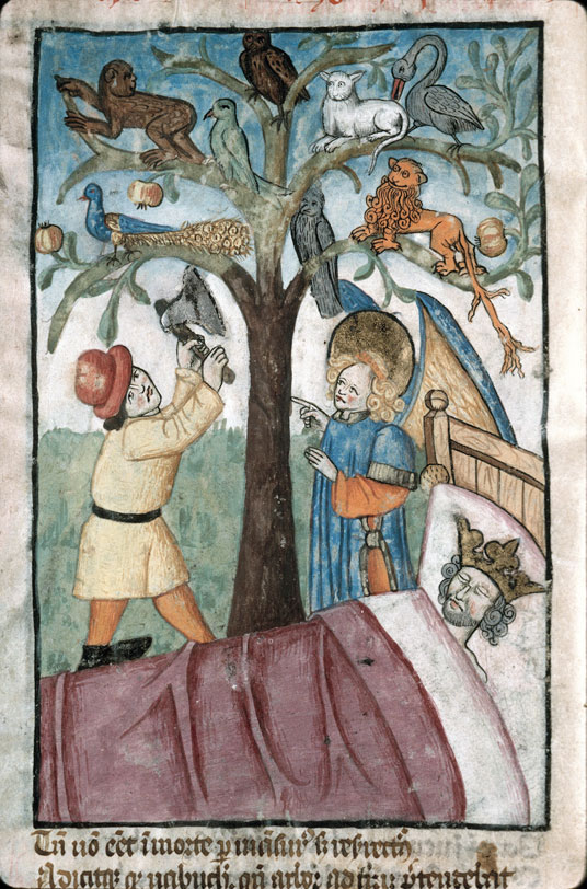 Songe de Nabuchodonosor: l'arbre abattu. Ars moriendi, Marseille - BM - ms. 0089 (f. 024v )